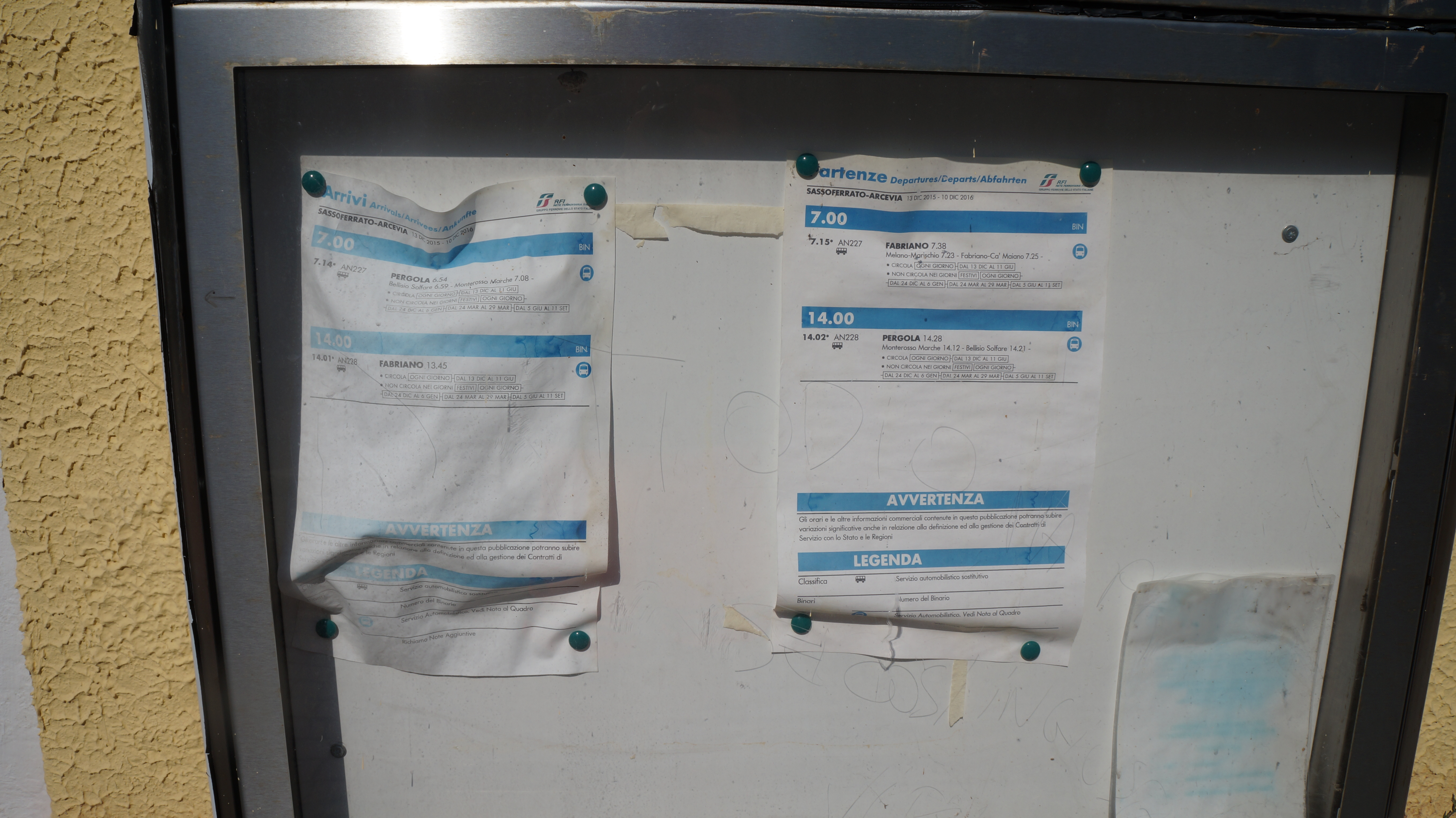 Ultimo orario ferroviario del 2015, già vediamo che la coppia di treni è stata sostituita con le autocorse